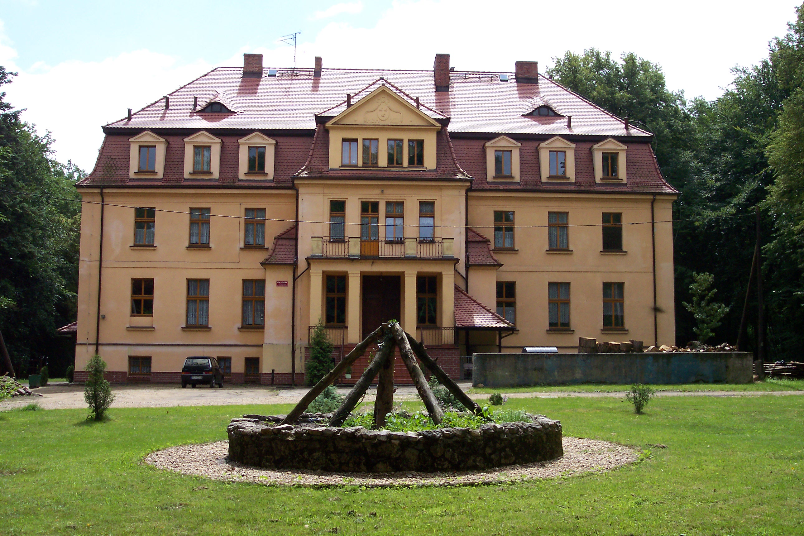 Waisenhaus in Ciasna